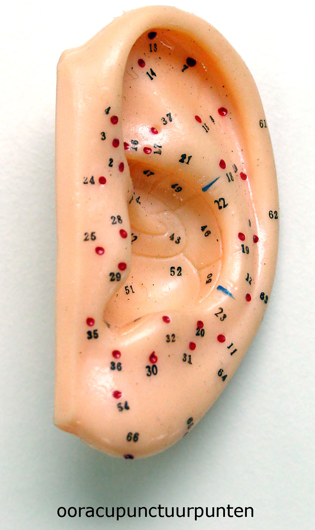 plaatsen voor ooracupunctuur (foto Wouter Hagens)